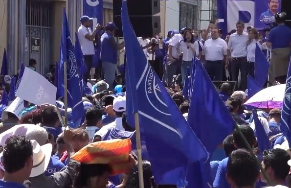 Marcha politica De El PCN. Durante los Comisios Presidenciales de El Salvador 2019